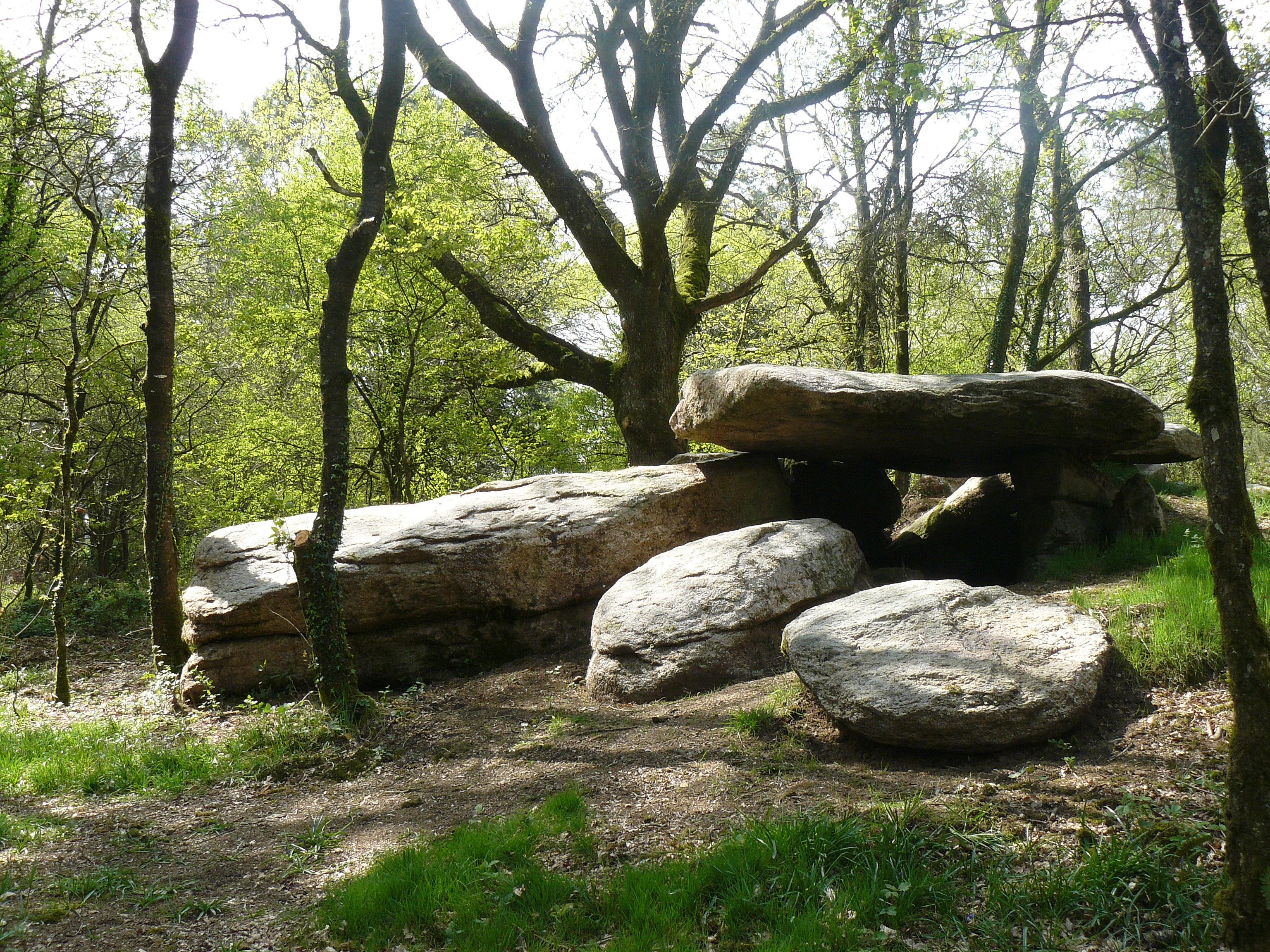 Dolmen de Roh-Koh-Koed situé sur la commune de Saint Jean Brévelay 56 FRANCE